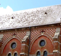 Bonneville (Somme, France) - L'église (en briques) avec son décor latéral en damier.